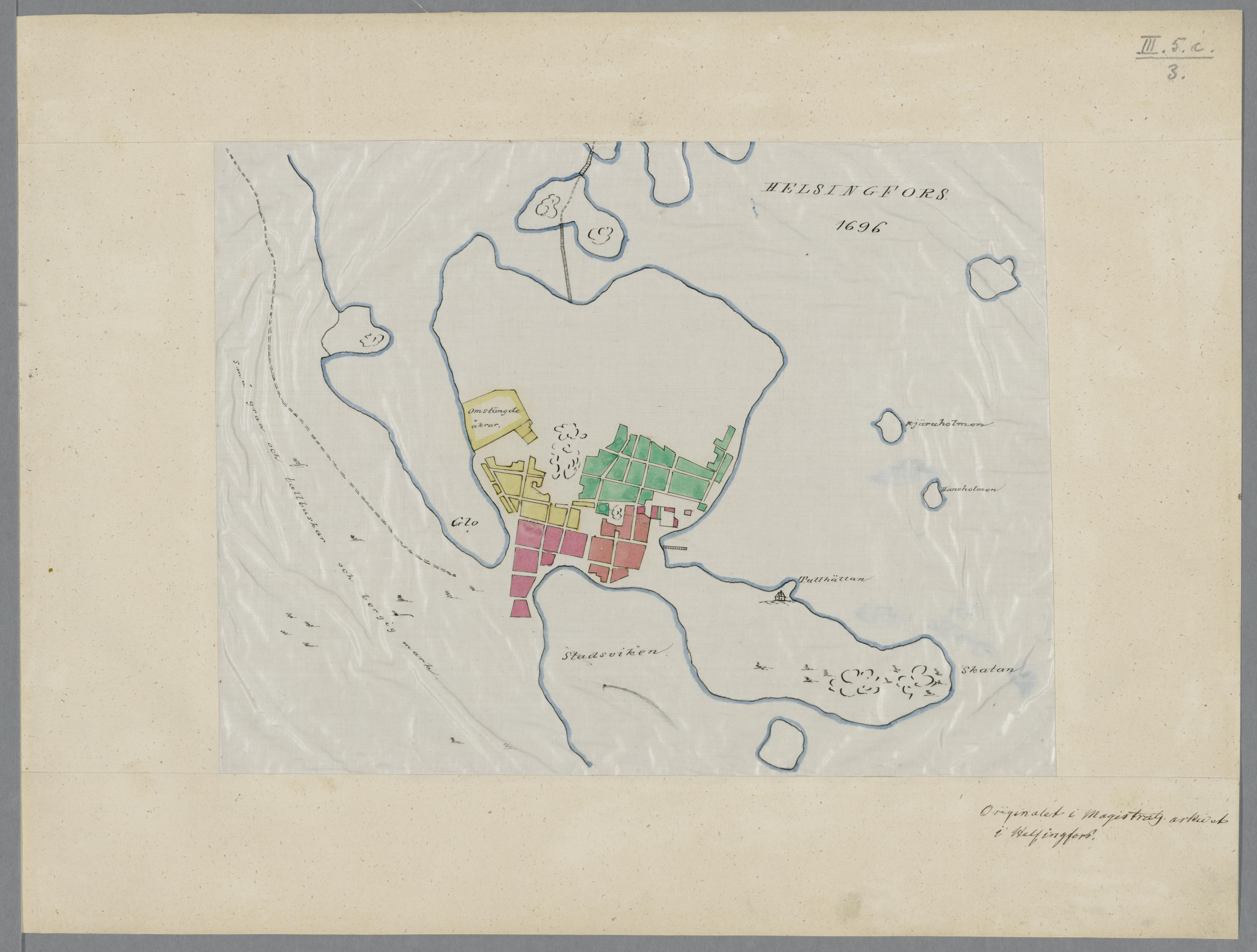 Plankarta öfver den till ämnade staden i Södernäs, 1639. Kopia efter original i Magistratens arkiv i Helsingfors.